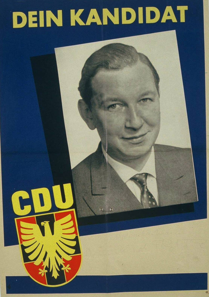 Dein Kandidat Abbildung: Porträtfoto Kommentar: Name fehlt auf Plakat Plakatart: Kandidaten-/Personenplakat mit Porträt Objekt-Signatur: 10-001: 731 Bestand: Plakate zu Bundestagswahlen (10-001) GliederungBestand10-18: Plakate zu Bundestagswahlen (10-001) » Die 3. Bundestagswahl am 15. September 1957 » CDU » Mit Porträtfoto Lizenz: KAS/ACDP 10-001: 731 CC-BY-SA 3.0 DE